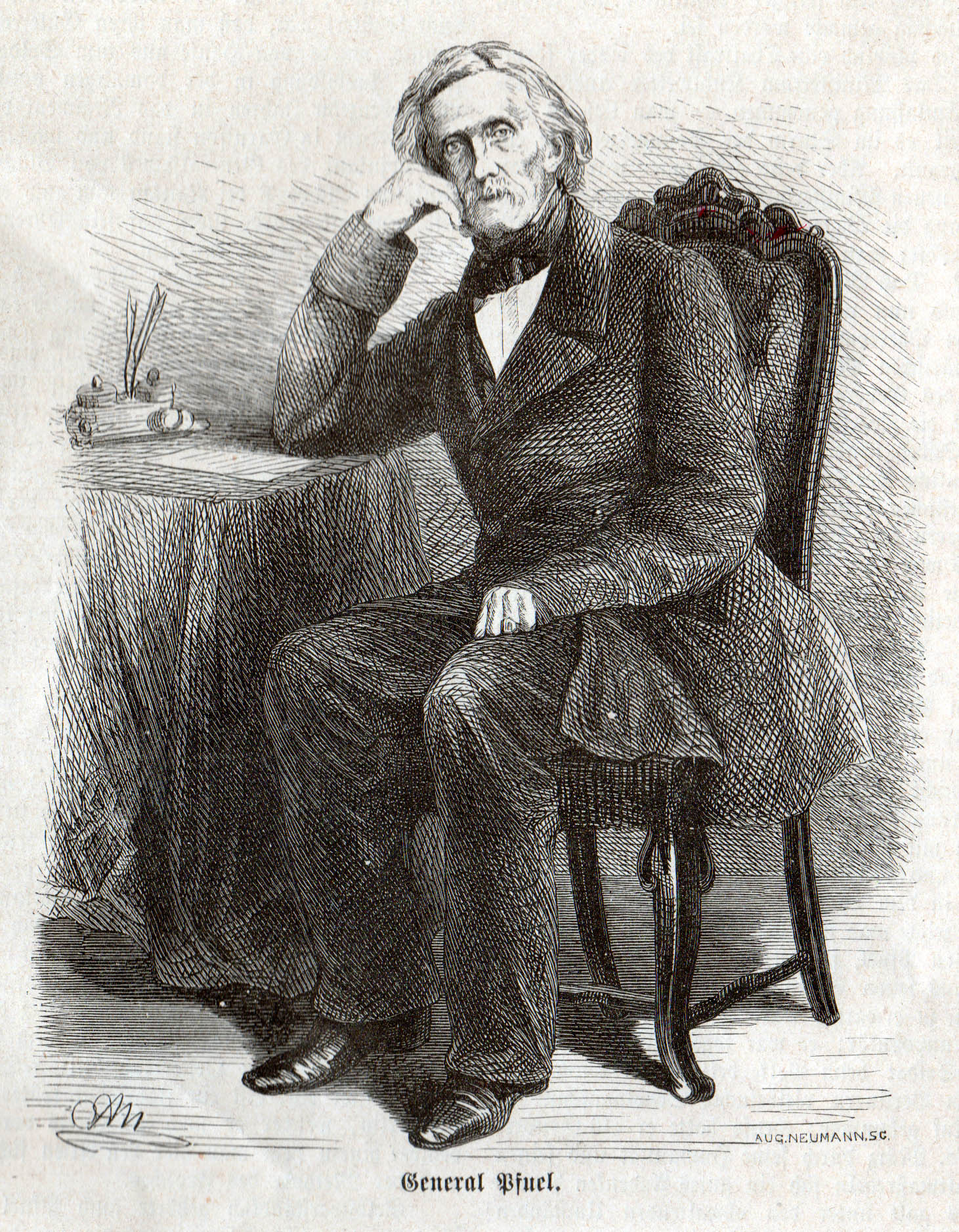 General Ernst von Pfuel (1779–1866), preußischer General der Infanterie, Ministerpräsident und Kriegsminister